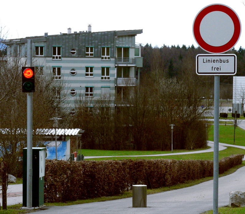 Per Funk sendet der Bus ein Signal an die Anlage und sobald der Poller eingefahren ist schaltet die Ampel auf grün und der Bus kann fahren. Standort: Ravensburg Huberesch